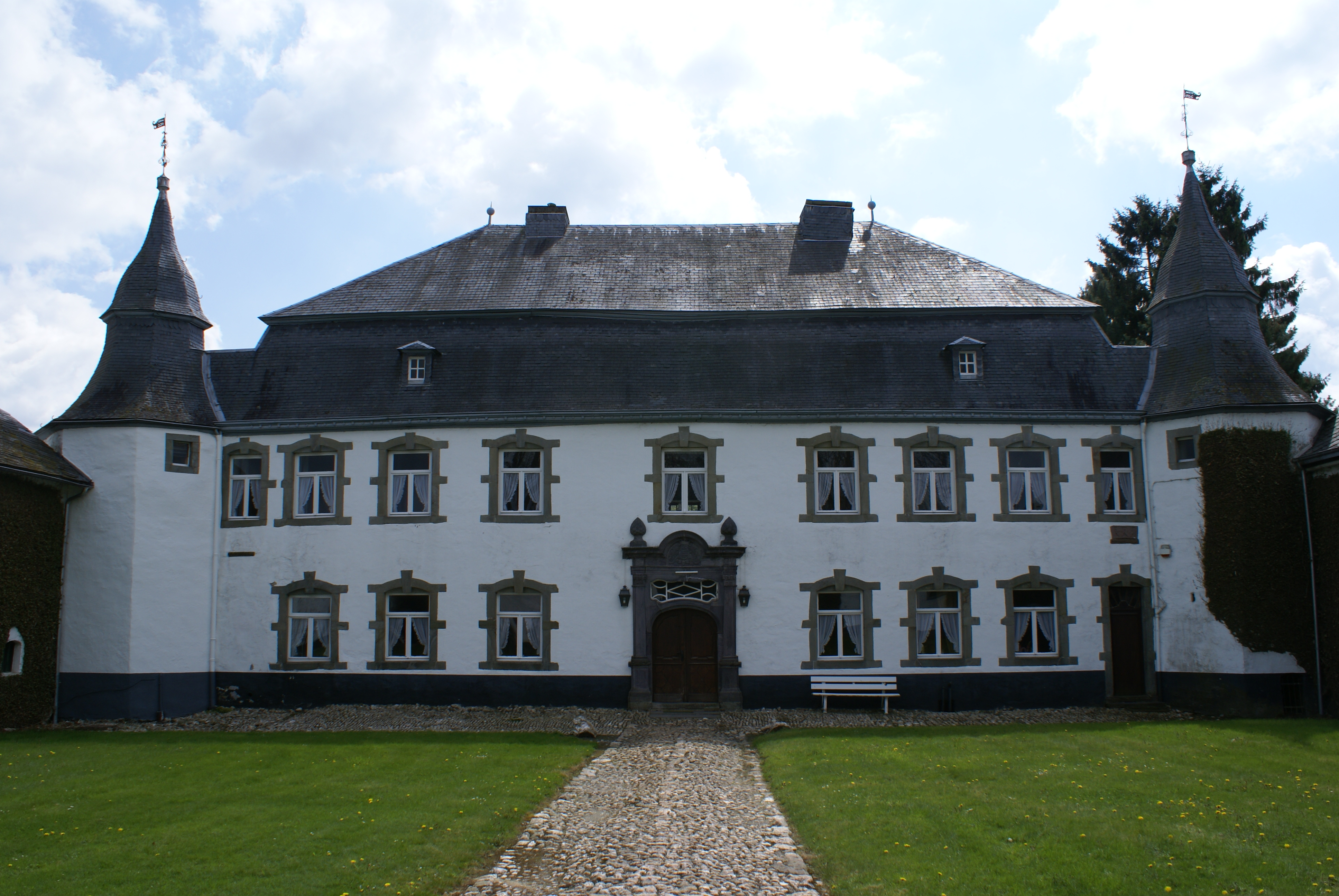 La cour intérieure du chateau "de Steinbach"